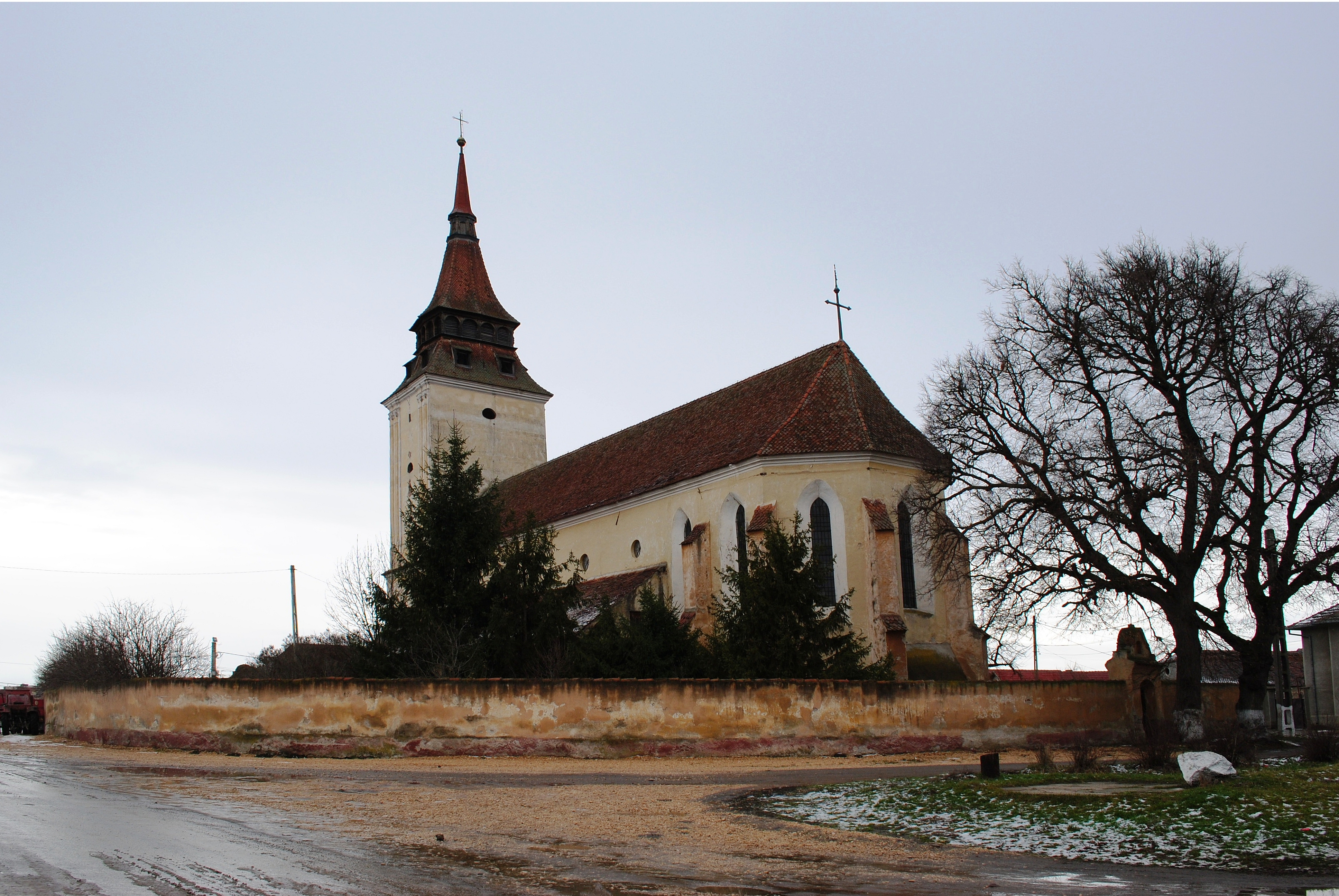 Ansamblul bisericii evanghelice, sec. XIII-XIX